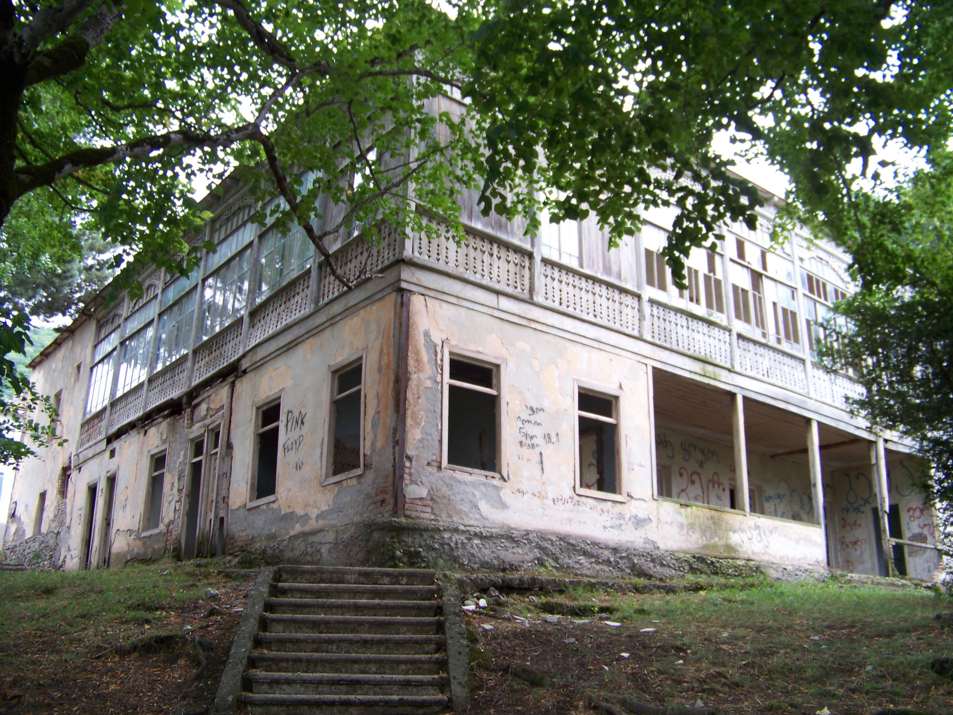 დიმიტრი ყიფიანის საცხოვრებელი სახლი